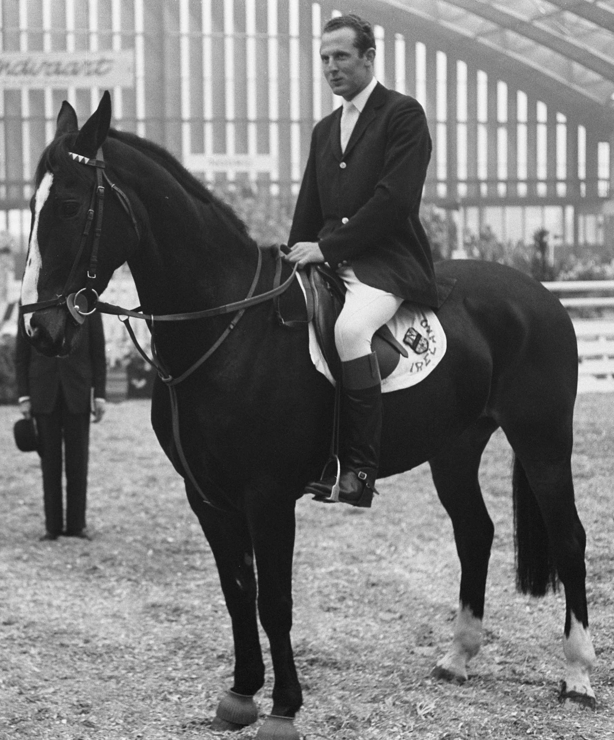 Jumping Amsterdam, jachtspringconcours om de grote prijs Nederland, Tonny Brennan (Ierland) winnaar